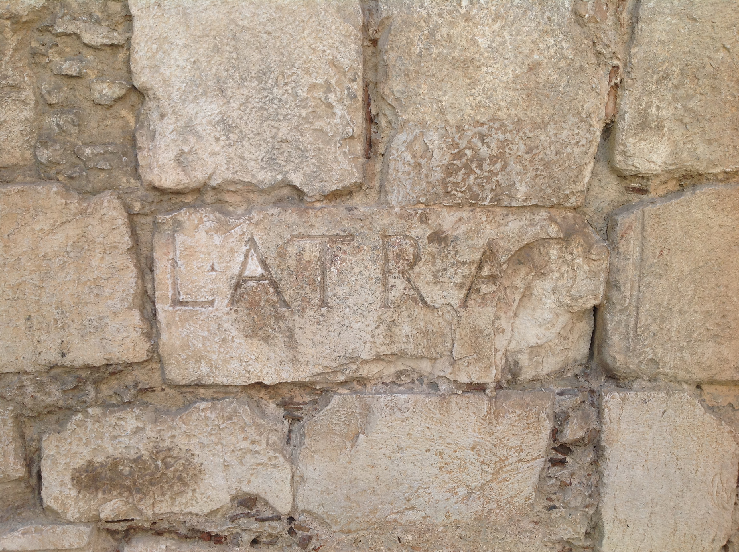 Iscrizione L·ATRA nel basamento del campanile, proveniente dal mausoleo di Lucio Sempronio Atratino.